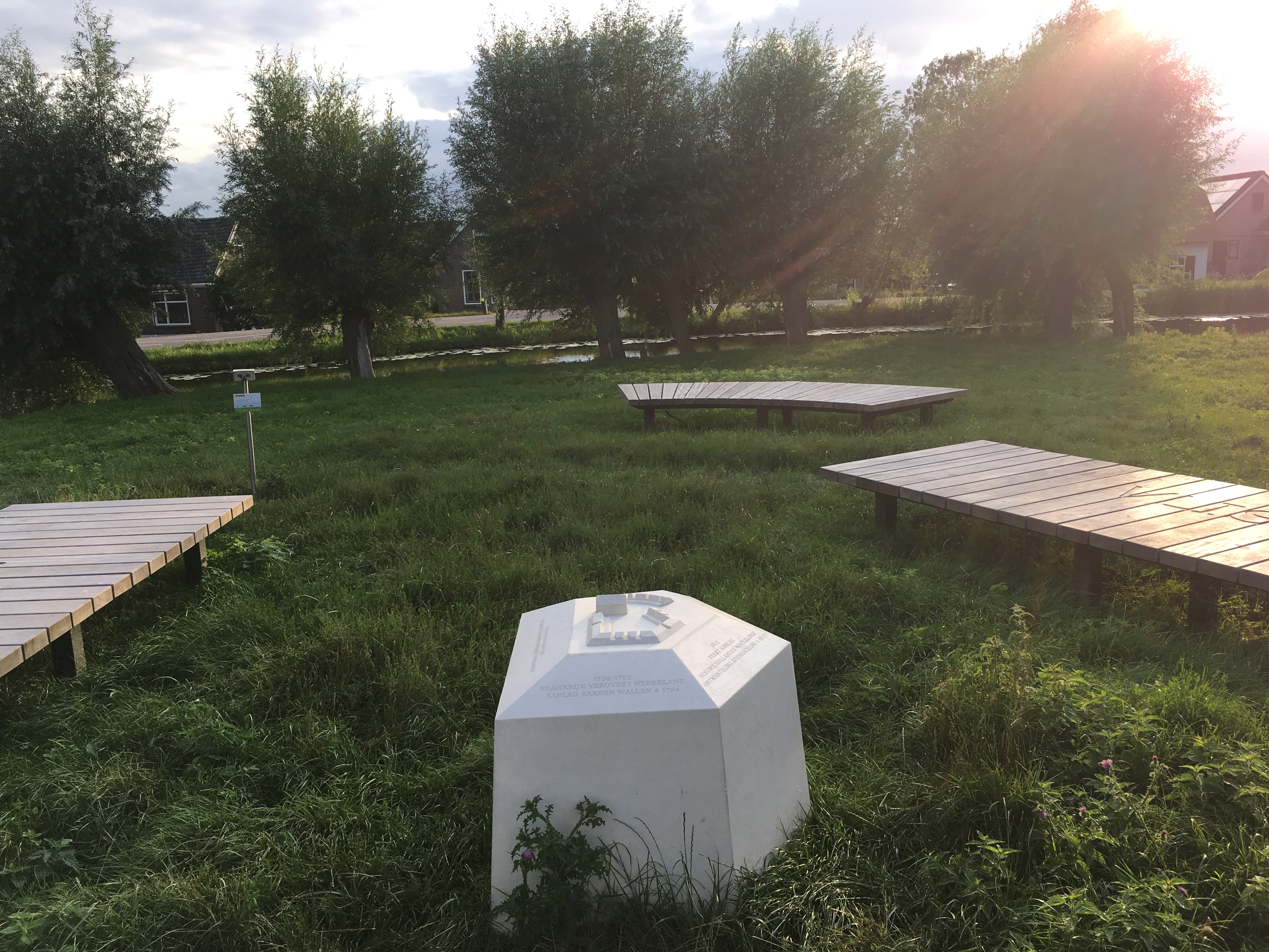 Koeneschans te Vlist, landschapsmarkeringen